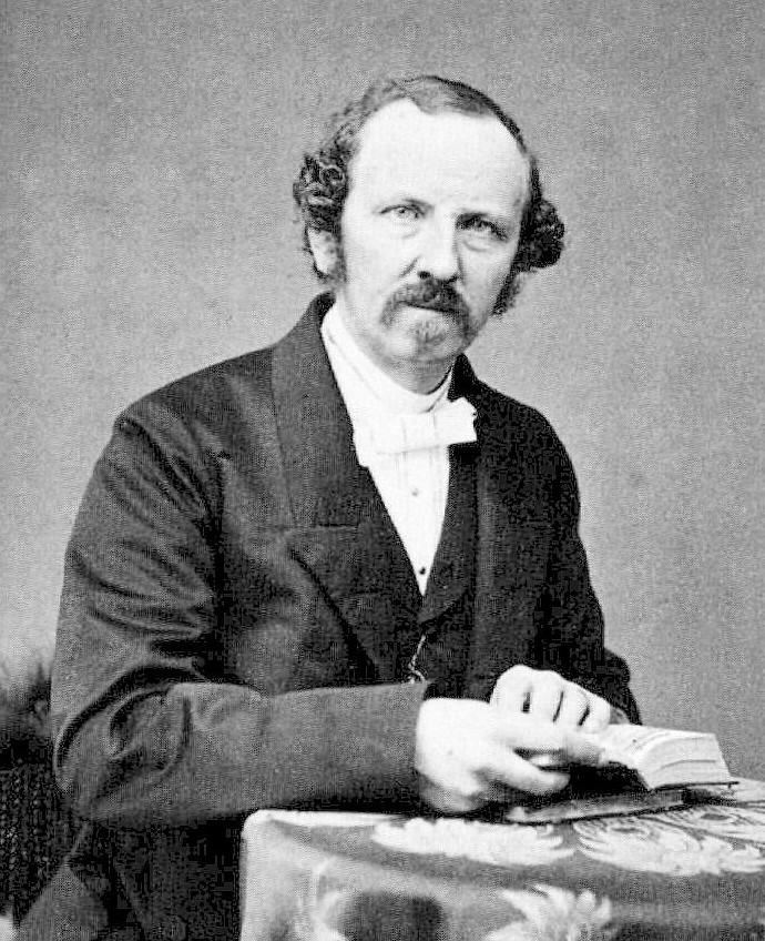 Adolphe Stackelberg var en svensk godsägare och brukspatron och en framträdande person i den nyevangeliska väckelsen.